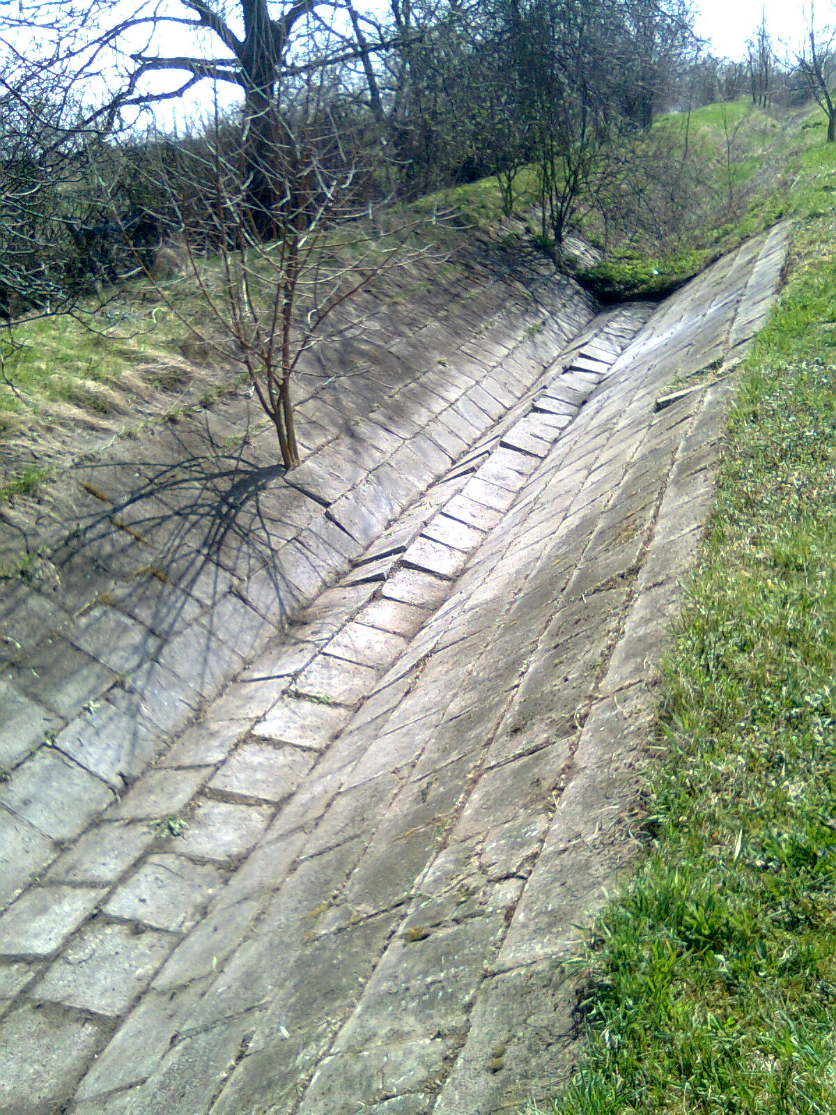 Az Eger-patak öntözőcsatornája Maklár belterületén